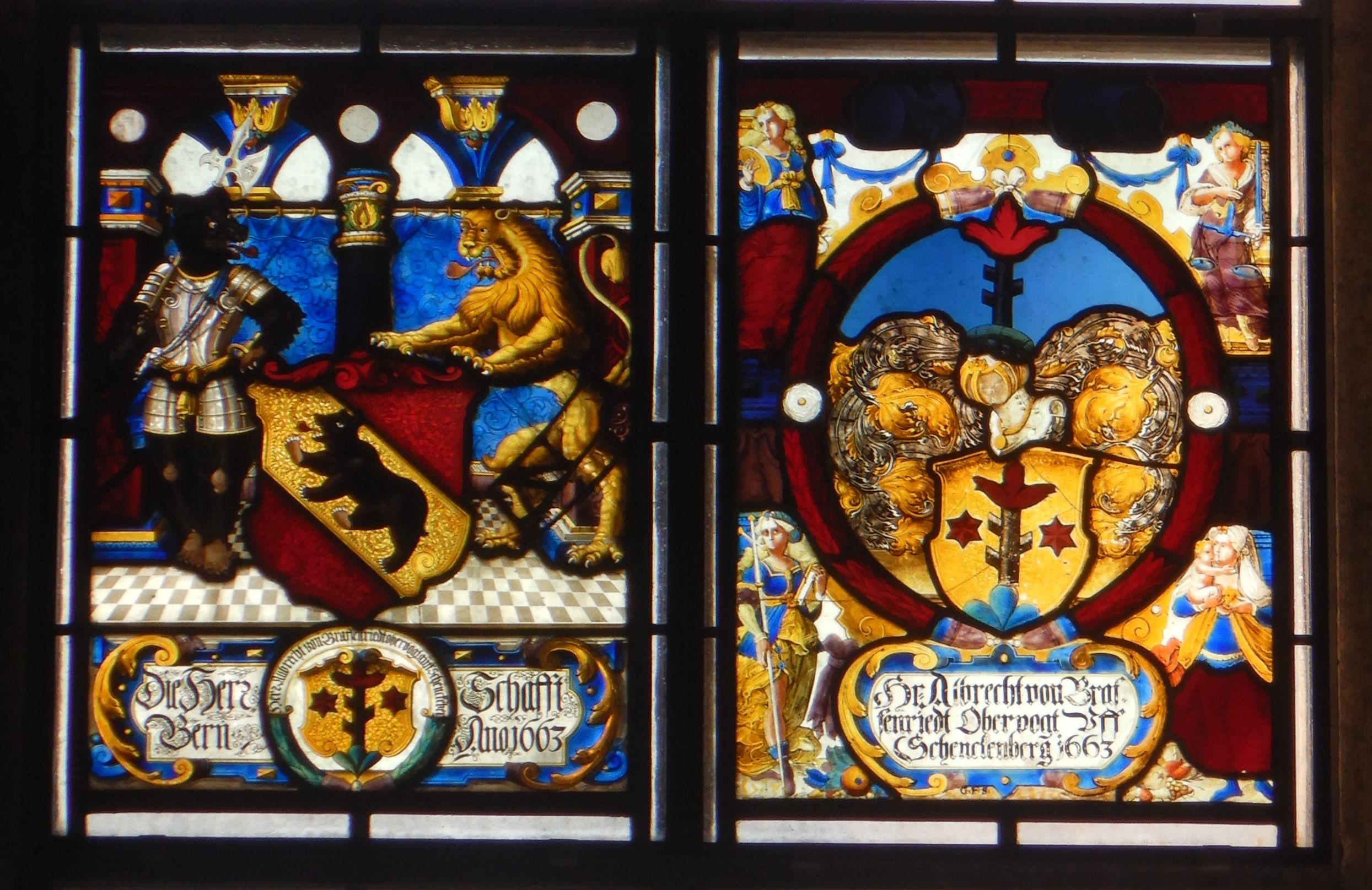 Glasfenster in der Reformierten Kirche Densbüren zur Erinnerung an die Errichtung der Kirche 1663.